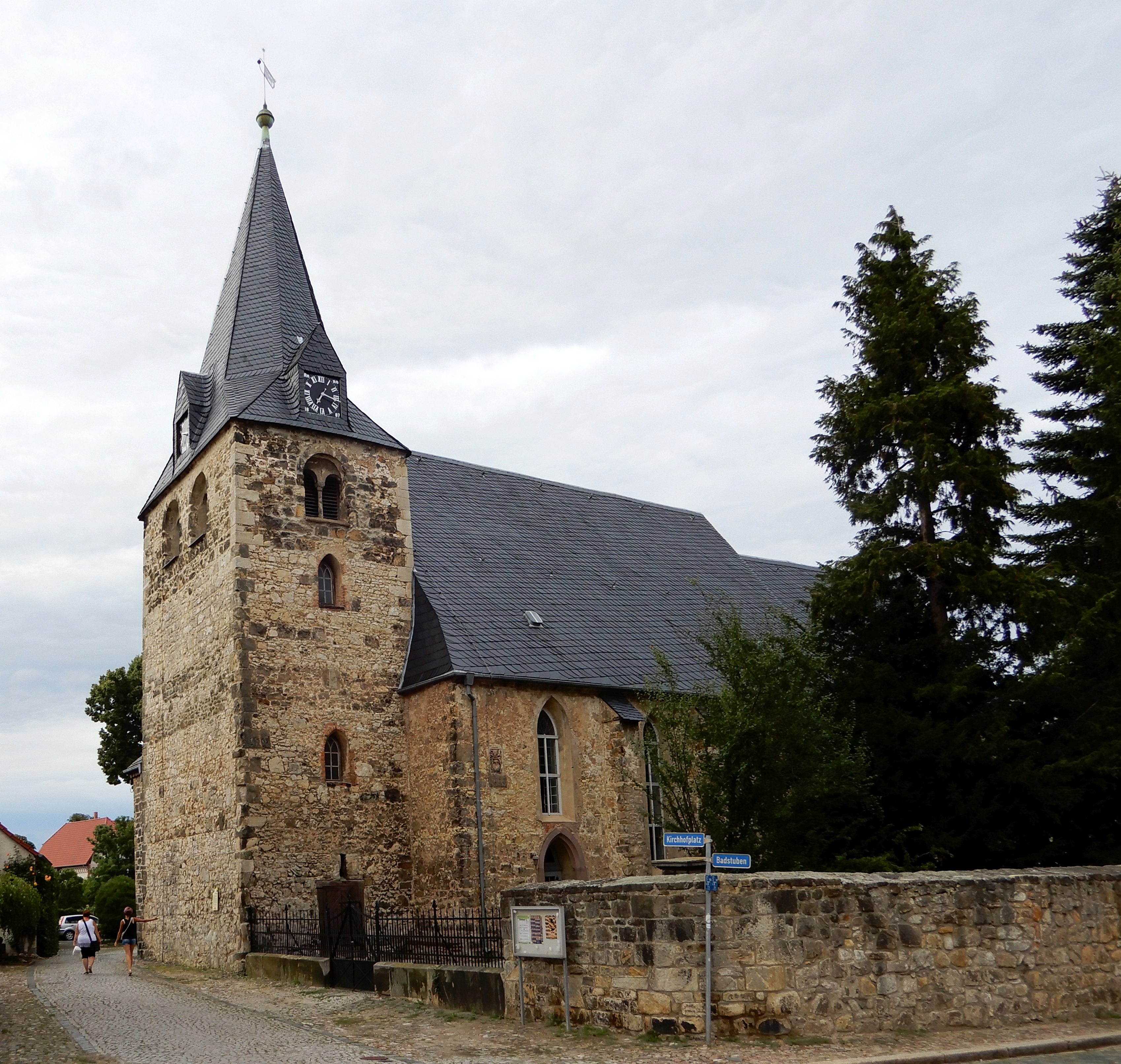 Die Kirche St. Nicolai in Ballenstedt